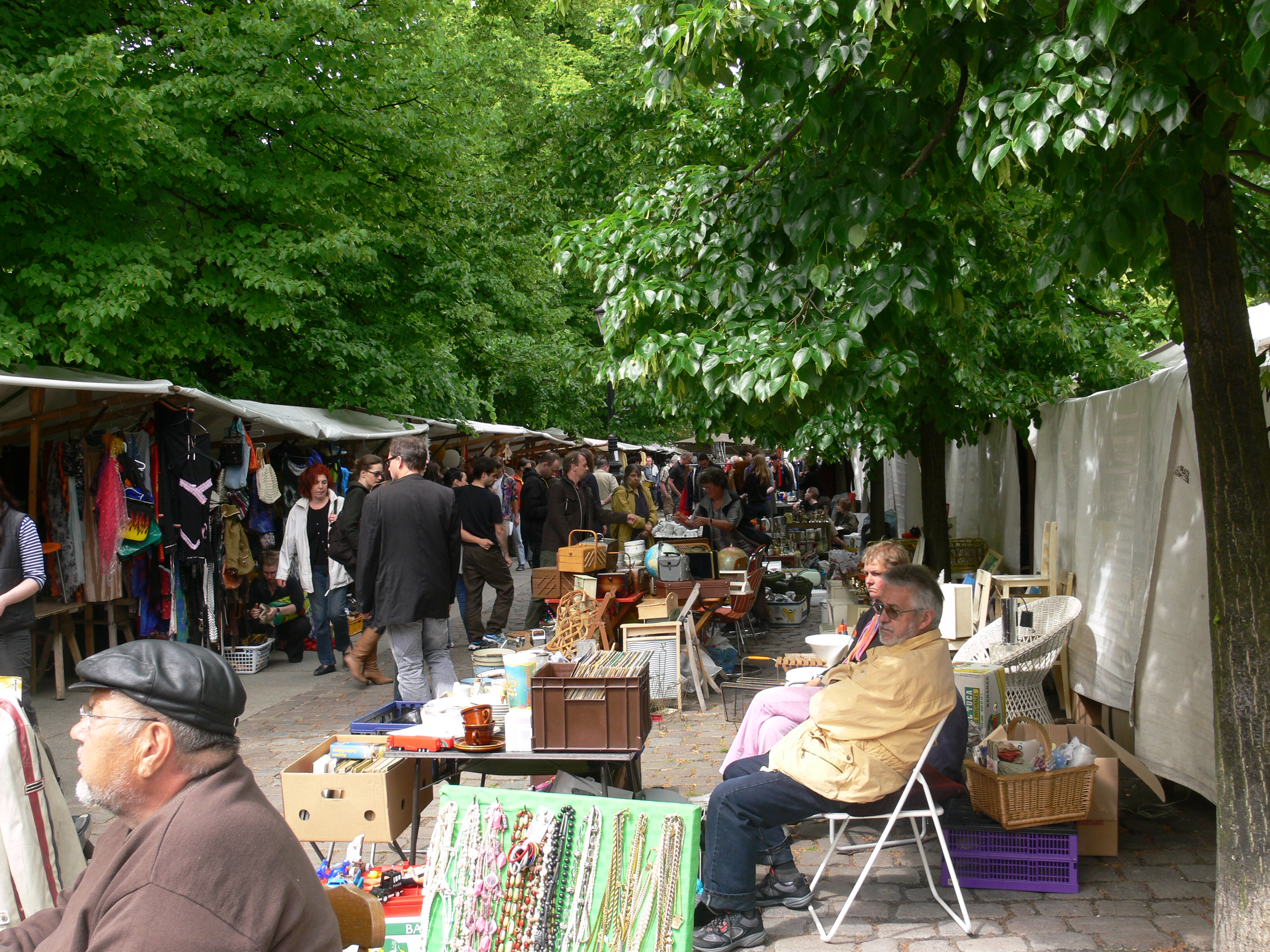 Berlin, Flohmarkt am Arkonaplatz